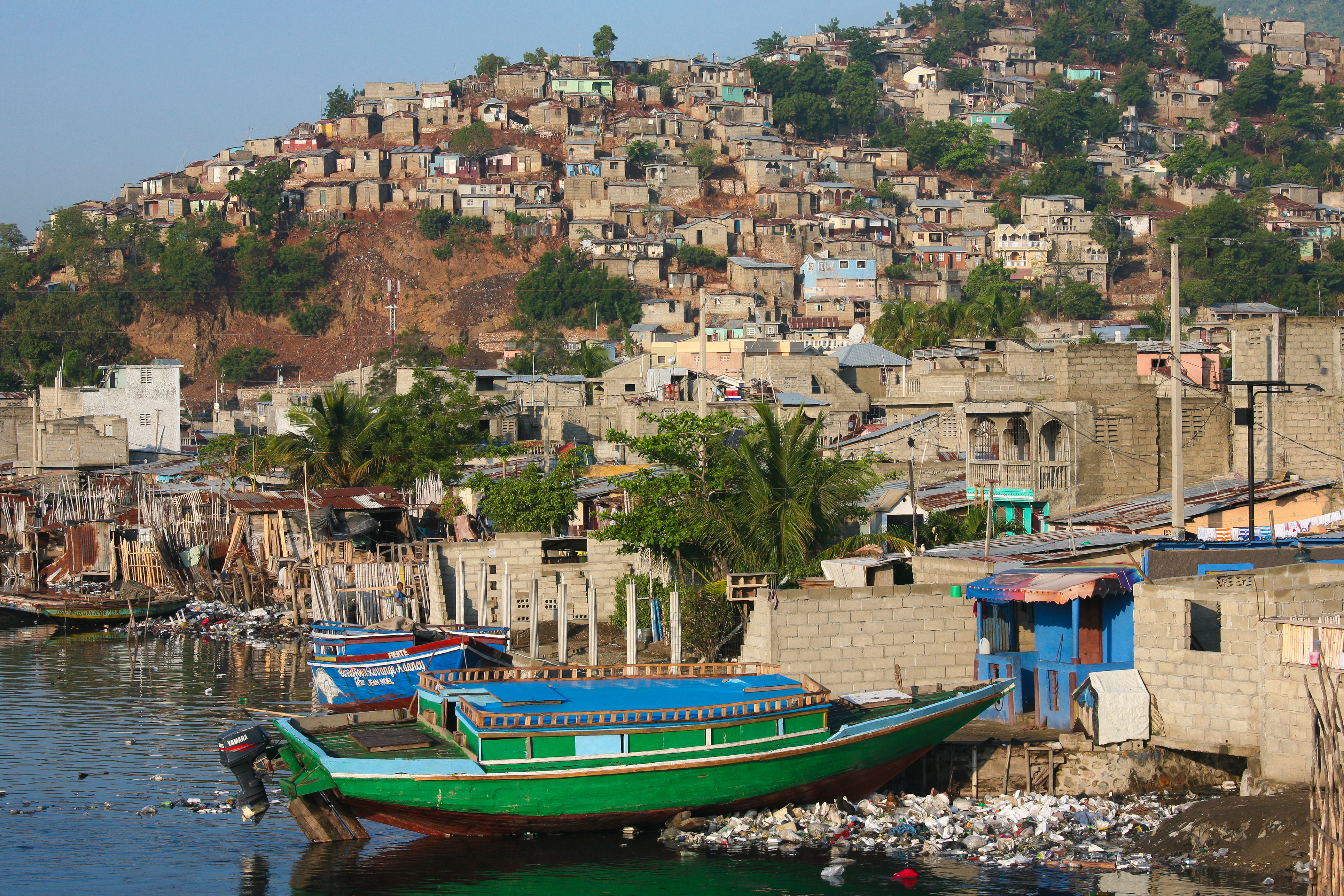 Cap-Haitien